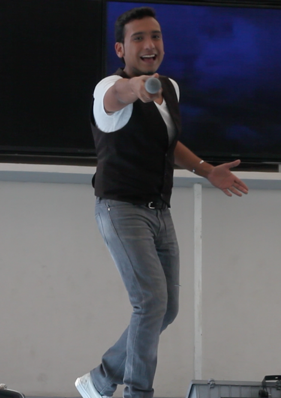 Japhet Bravo